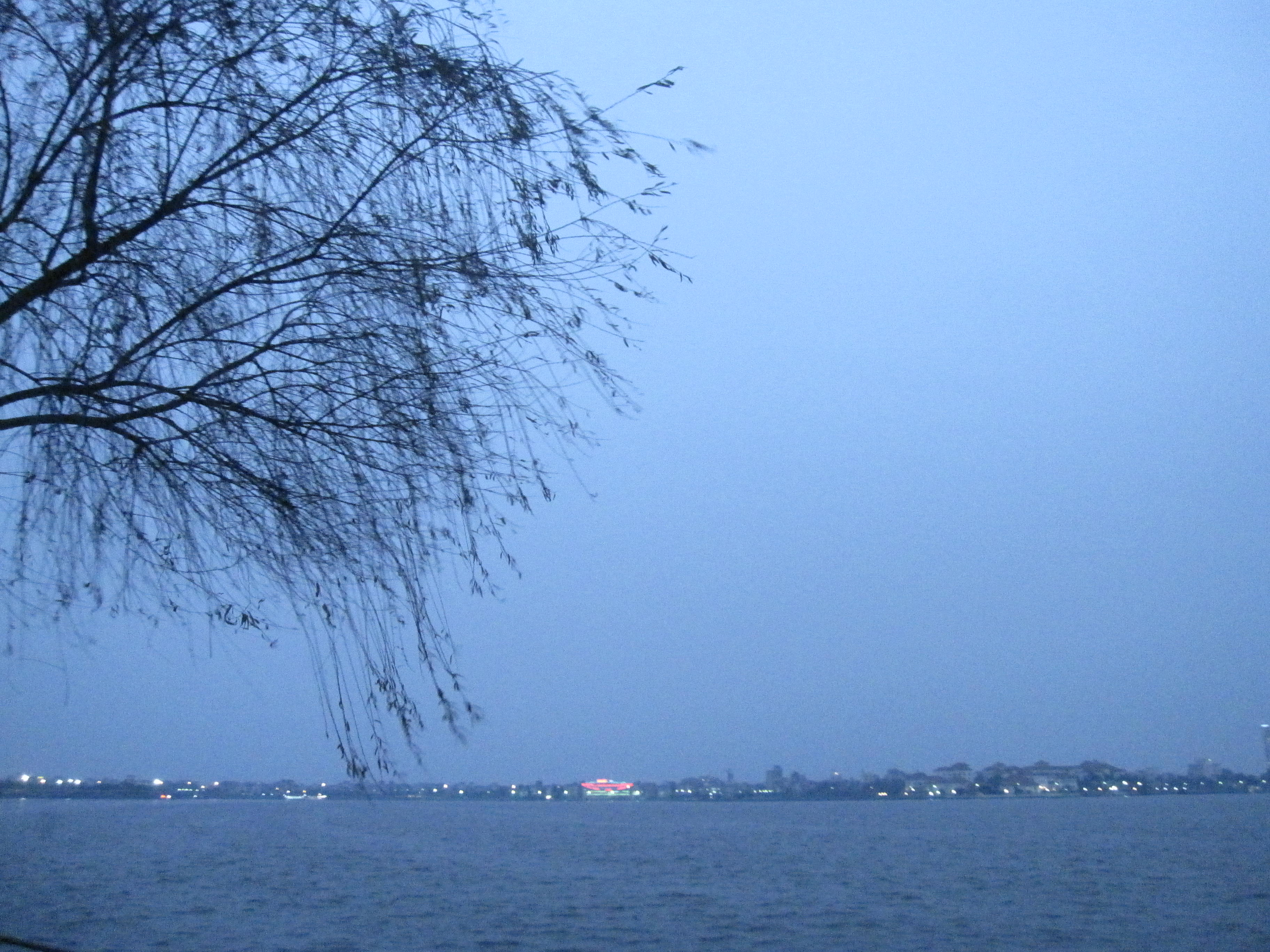 Chiều buông hồ Tây, nhìn từ phố Vệ Hồ